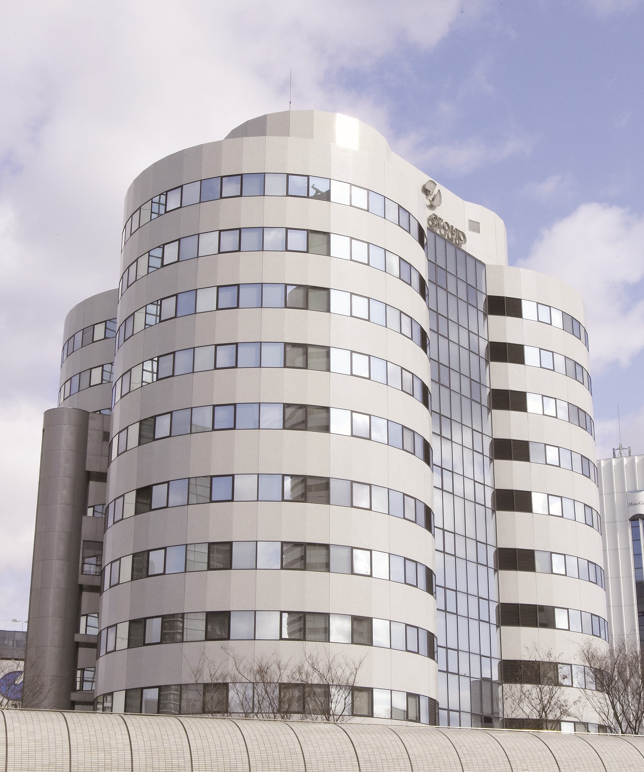 ジャヴァグループ本社ビル